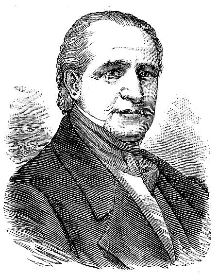 Giuseppe Bovara